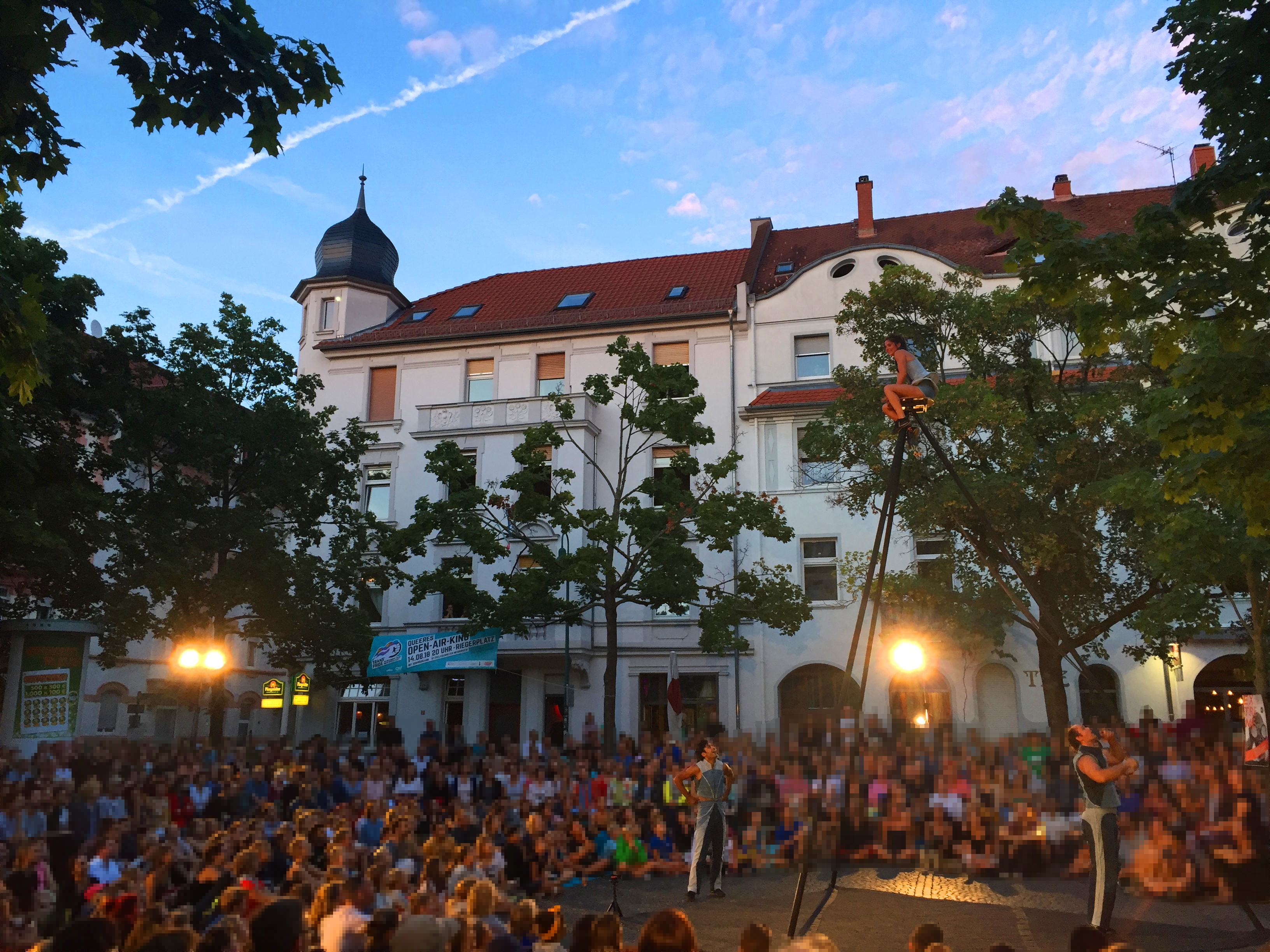 Das Straßentheaterfestival Just for Fun am 09.08.2018 auf dem Riegerplatz in Darmstadt.